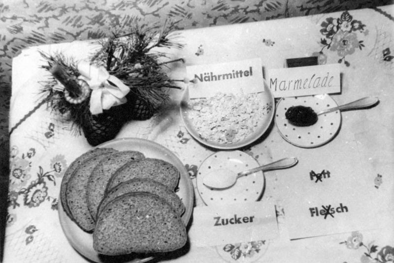 Die Tagesration eines Normalverbrauchers in der britischen Besatzungszone (1948) Foto-Illus 1566-48